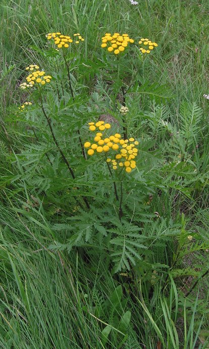 zelfgemaakte foto van Boerenwormkruid in berm; half augustus